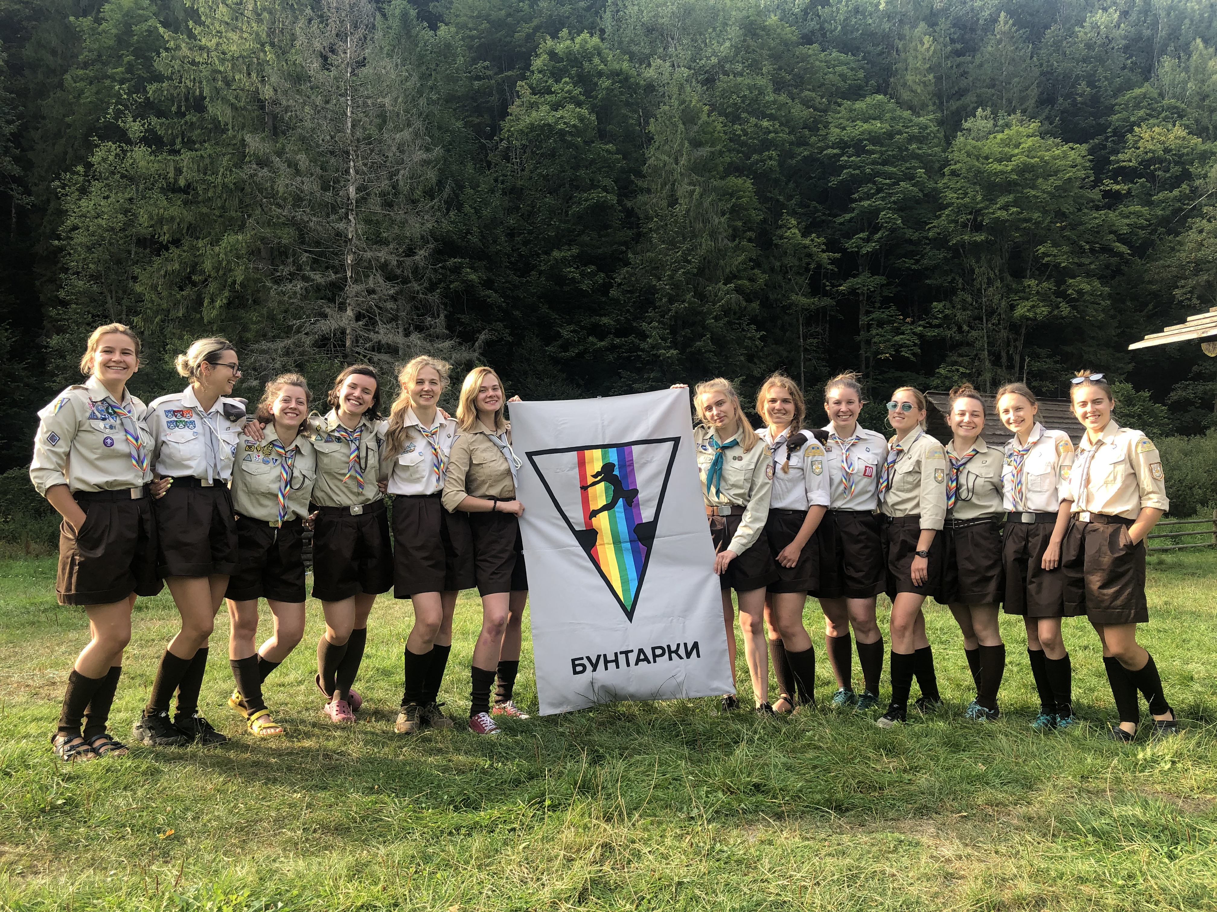 Бунтарки на Великій Раді, 24 серпня 2019 рік.